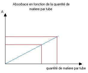 image cree par alpha.prim pour l'article dosage colorimétique Licensing Catégorie:Schémas